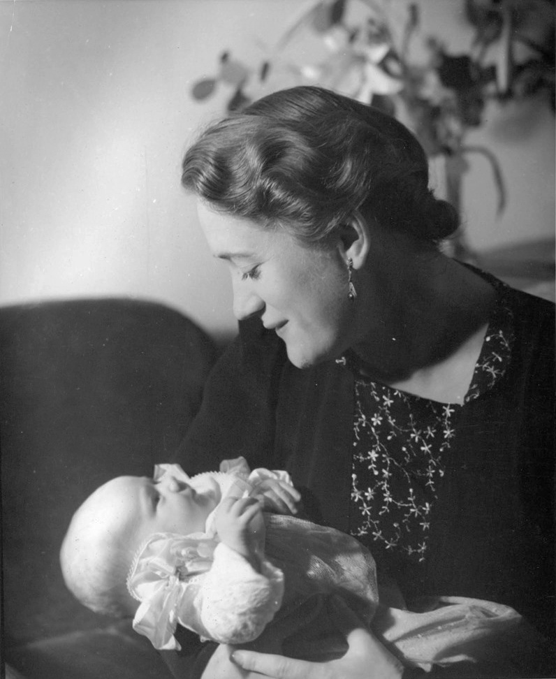 Beyron-Hertzberg, Brita, med dottern Katarina, 1937.